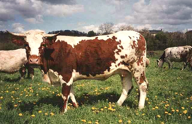 Vache de race ferrandaise.